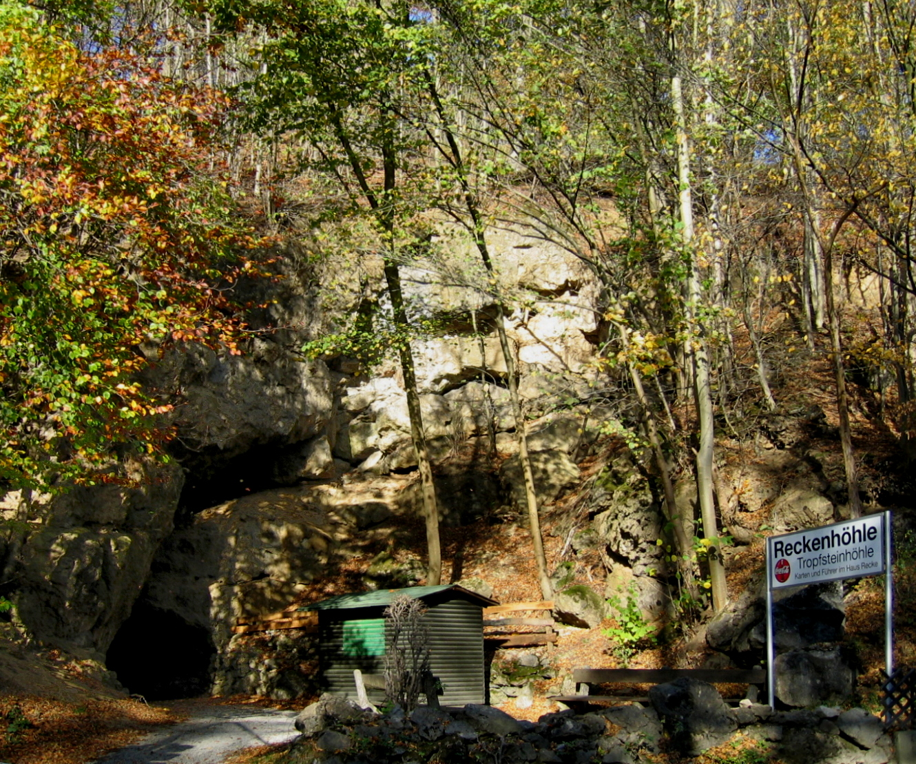 Description: Eingang zur Reckenhöhle im Hönnetal, Balve Source: selbst fotografiert Date: 31. Okt. 2005 Author: Asio otus